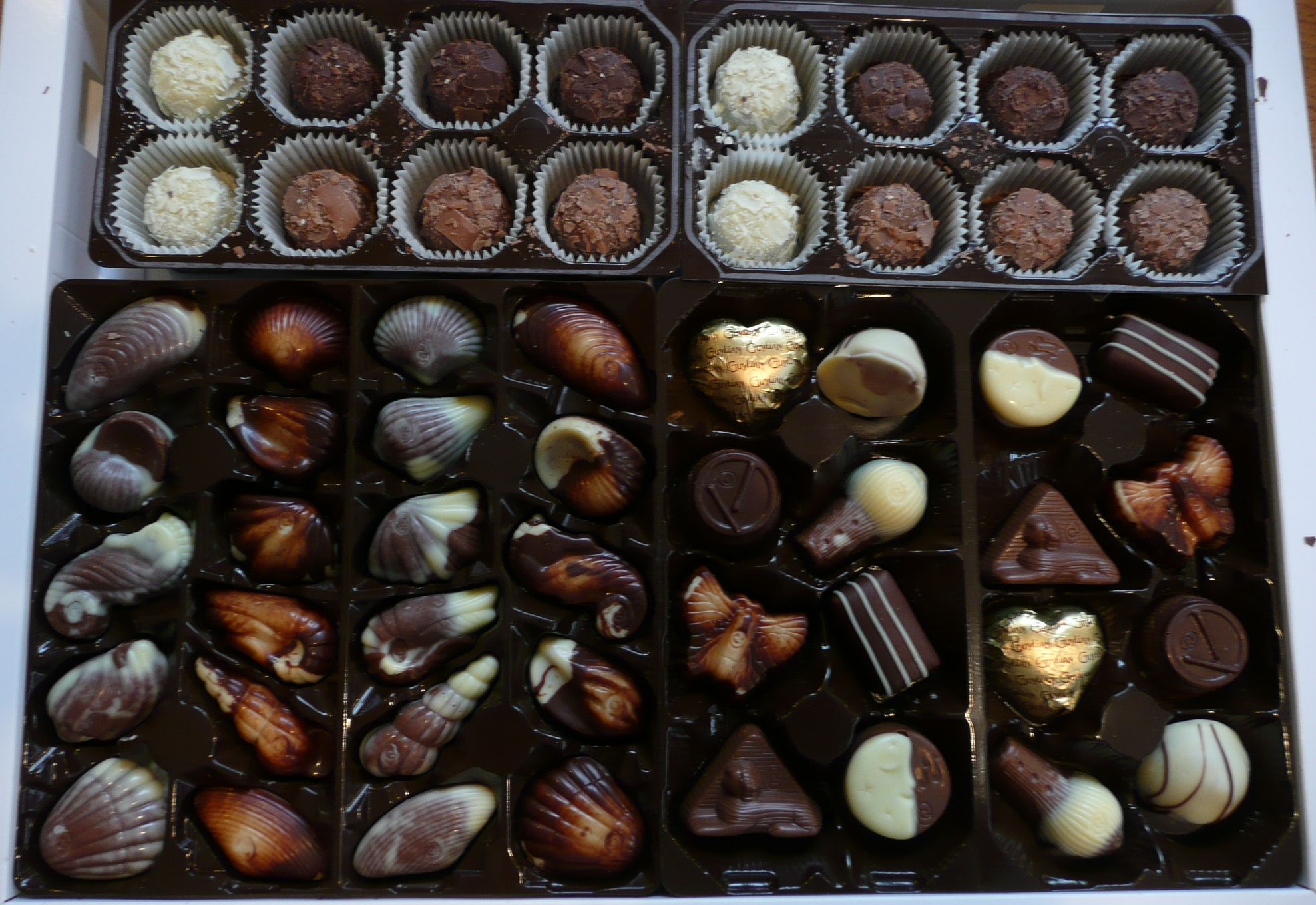 Chocolat